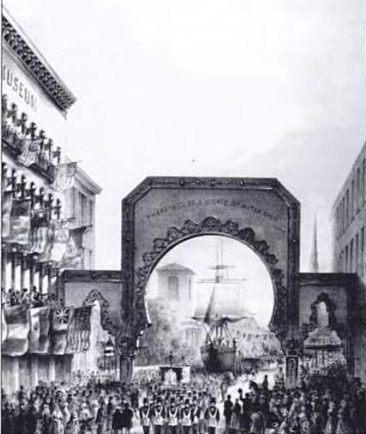 Boston, Massachusetts